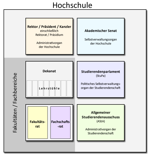 Übersicht über die deutsche Hochschulorganisation